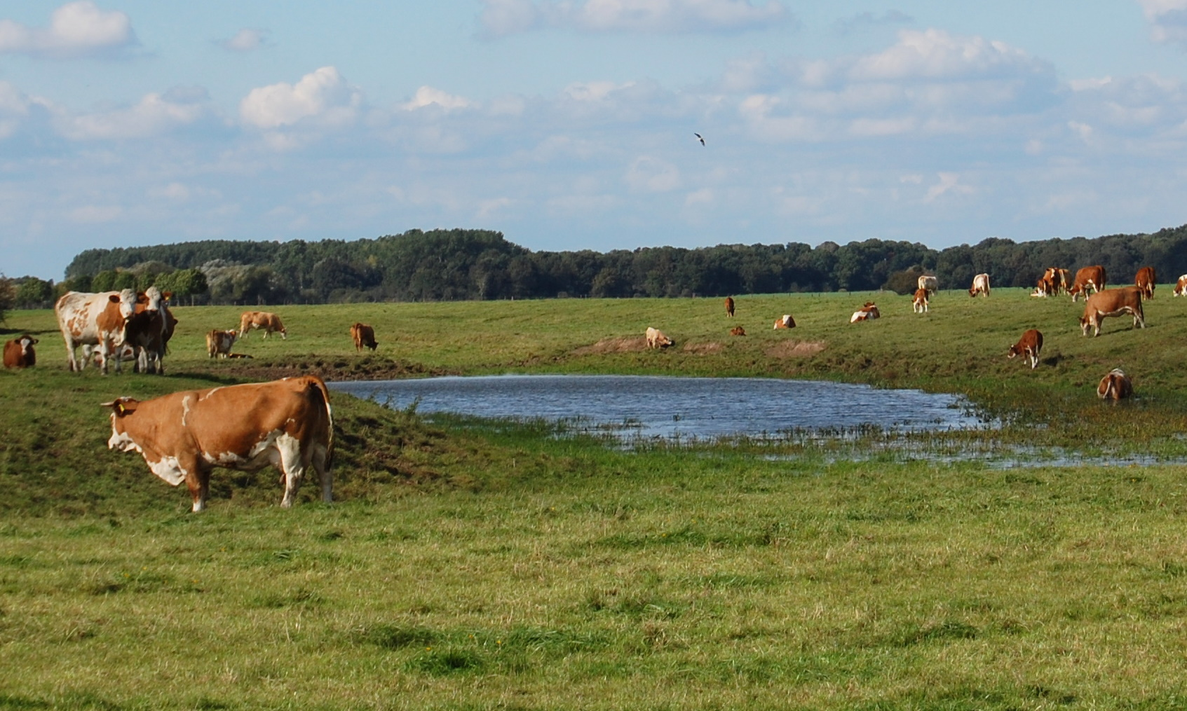 Fuchsbusch im Greifenwerder, Blick von Süden